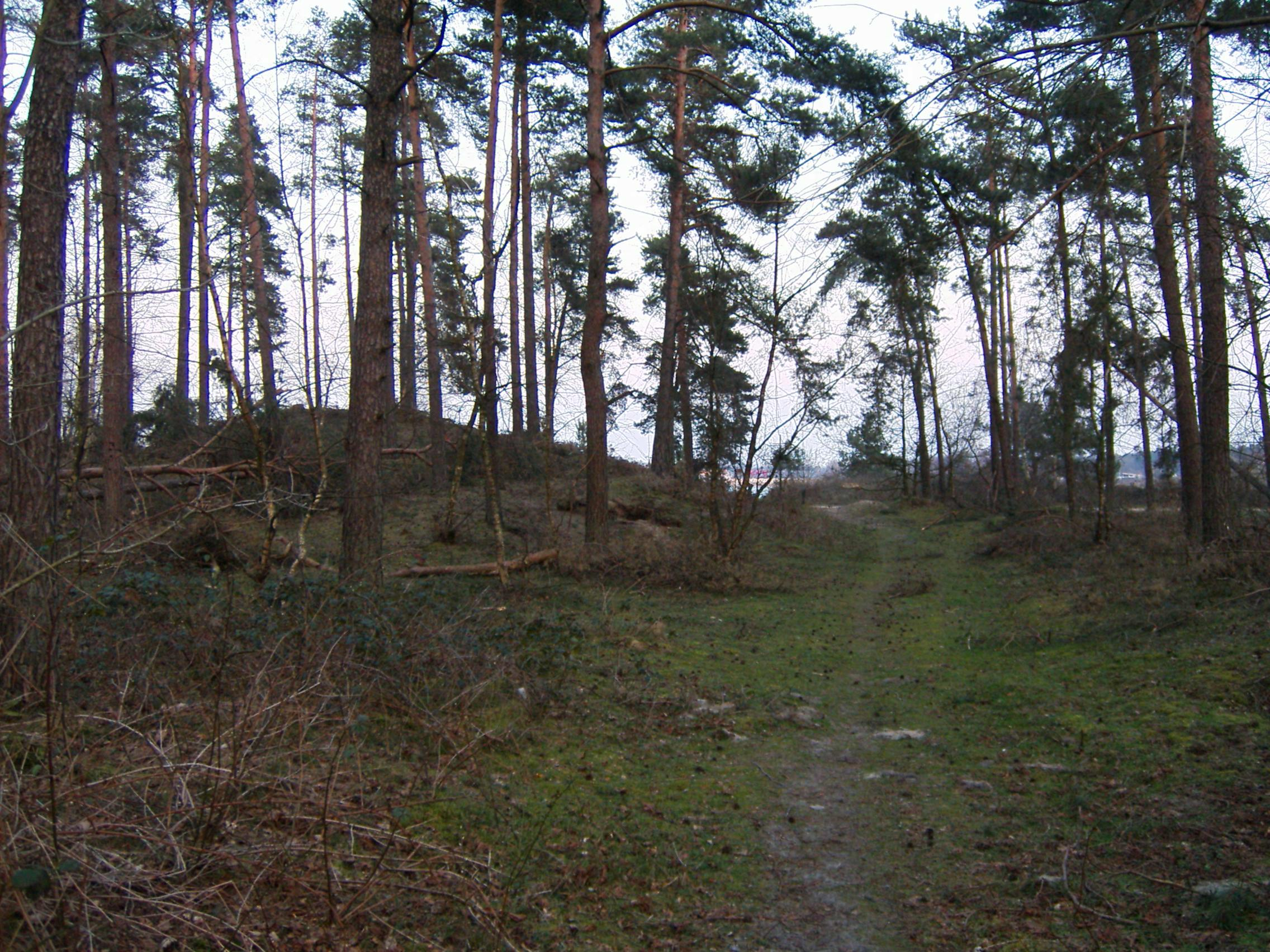 Blick vom ursprünglichen Kiessandzug auf den Offlumer See, links eine Flugsanddüne. Neuenkirchen (Kreis Steinfurt) Blick Richtung Südosten, ganz im Hintergrund sind die roten Trichtertürme zu erkennen.